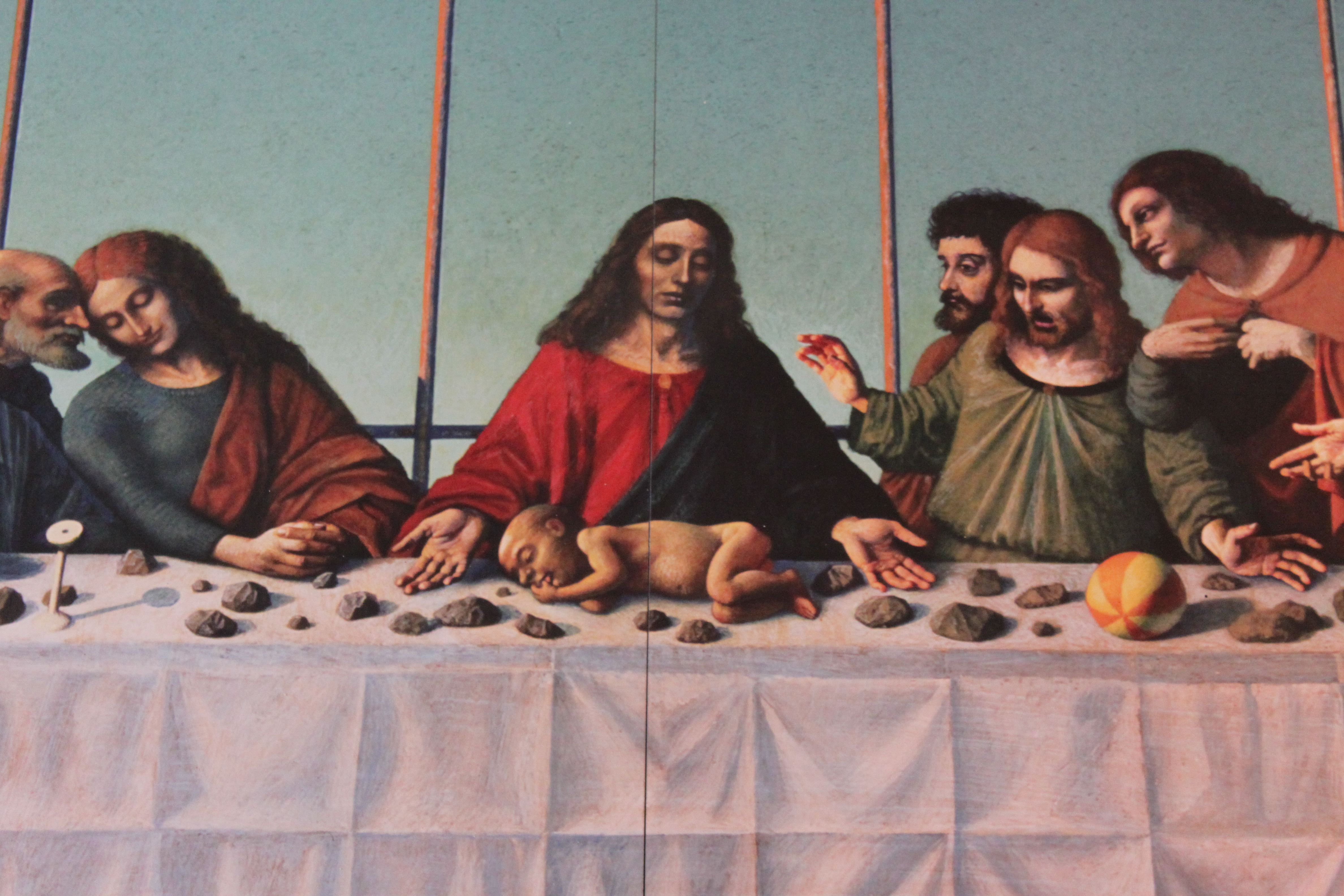 Kunst im öffentlichen Raumdetail